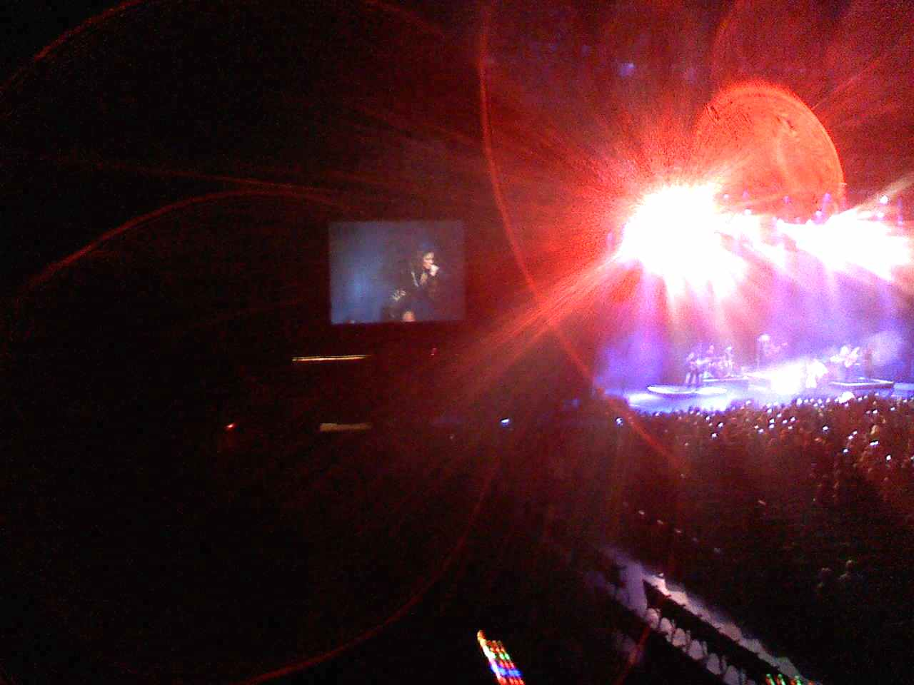 Concierto de la cantante Anahi en Buenos Aires, Argentina. Luna Park, el 5 de diciembre del 2009, como parte de "Mi Delirio World Tour"